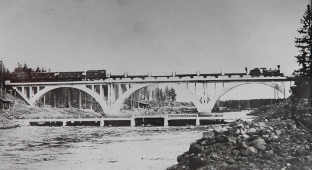 Мост через р. Янисйоки, лесобиржа. 23.02.1921.